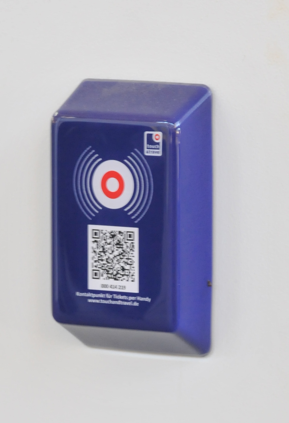 DB Touch-point kaartlezer met QR-code en NFC-chip van mobile telefoon.